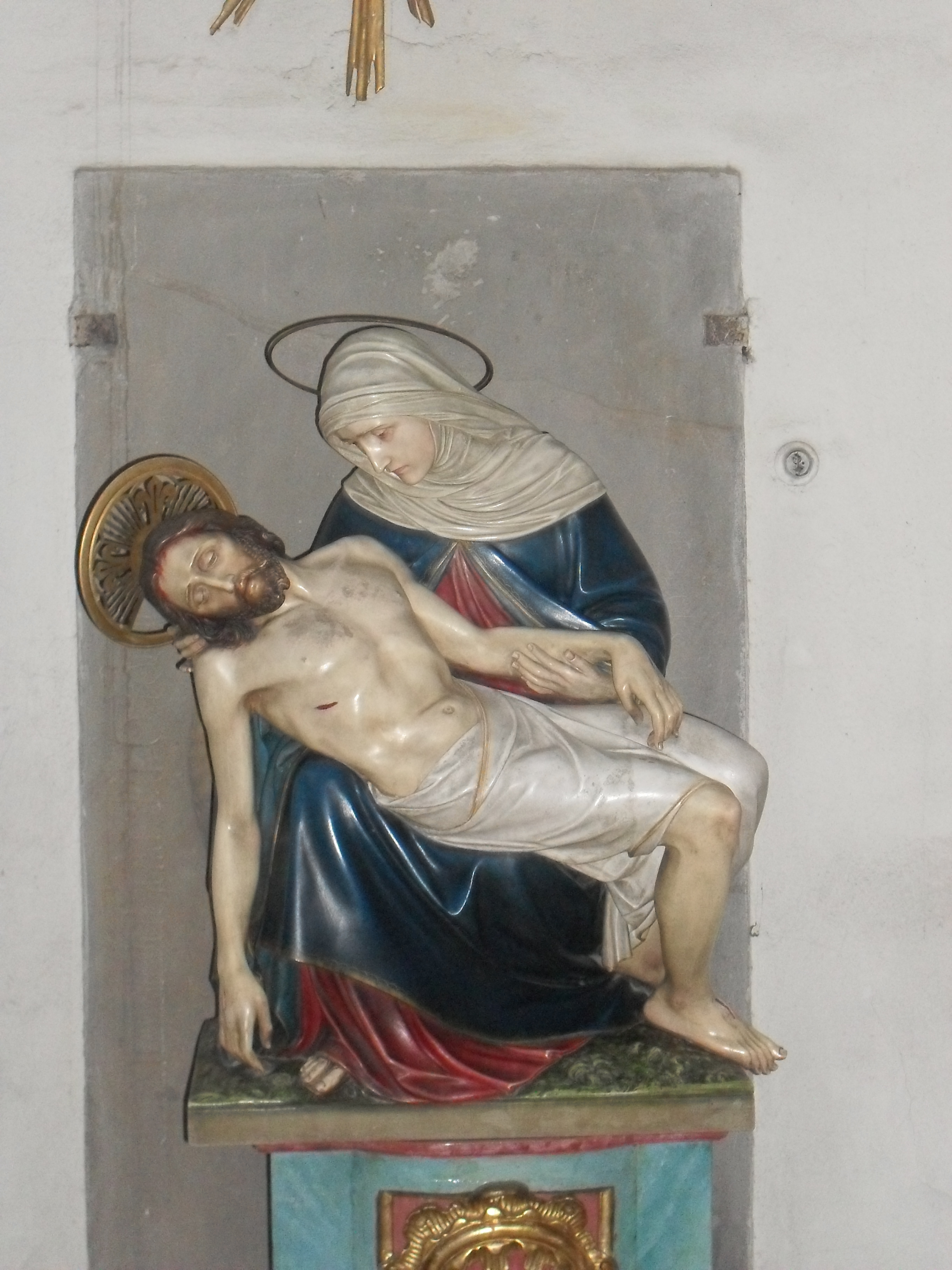 Wrocław. kościół pw. św. Macieja, pieta